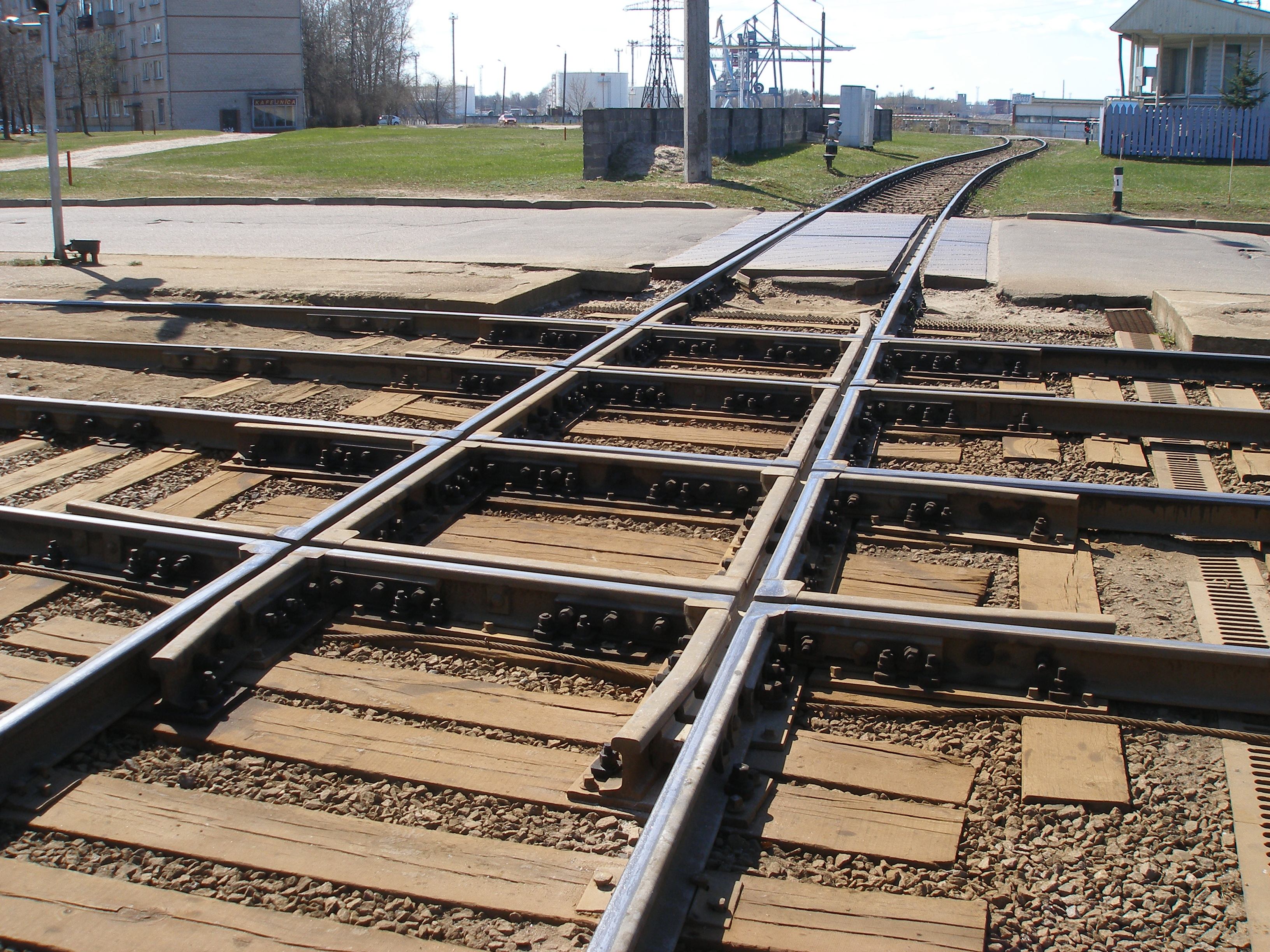 Tramvaja un dzelzceļa sliežu krustojums